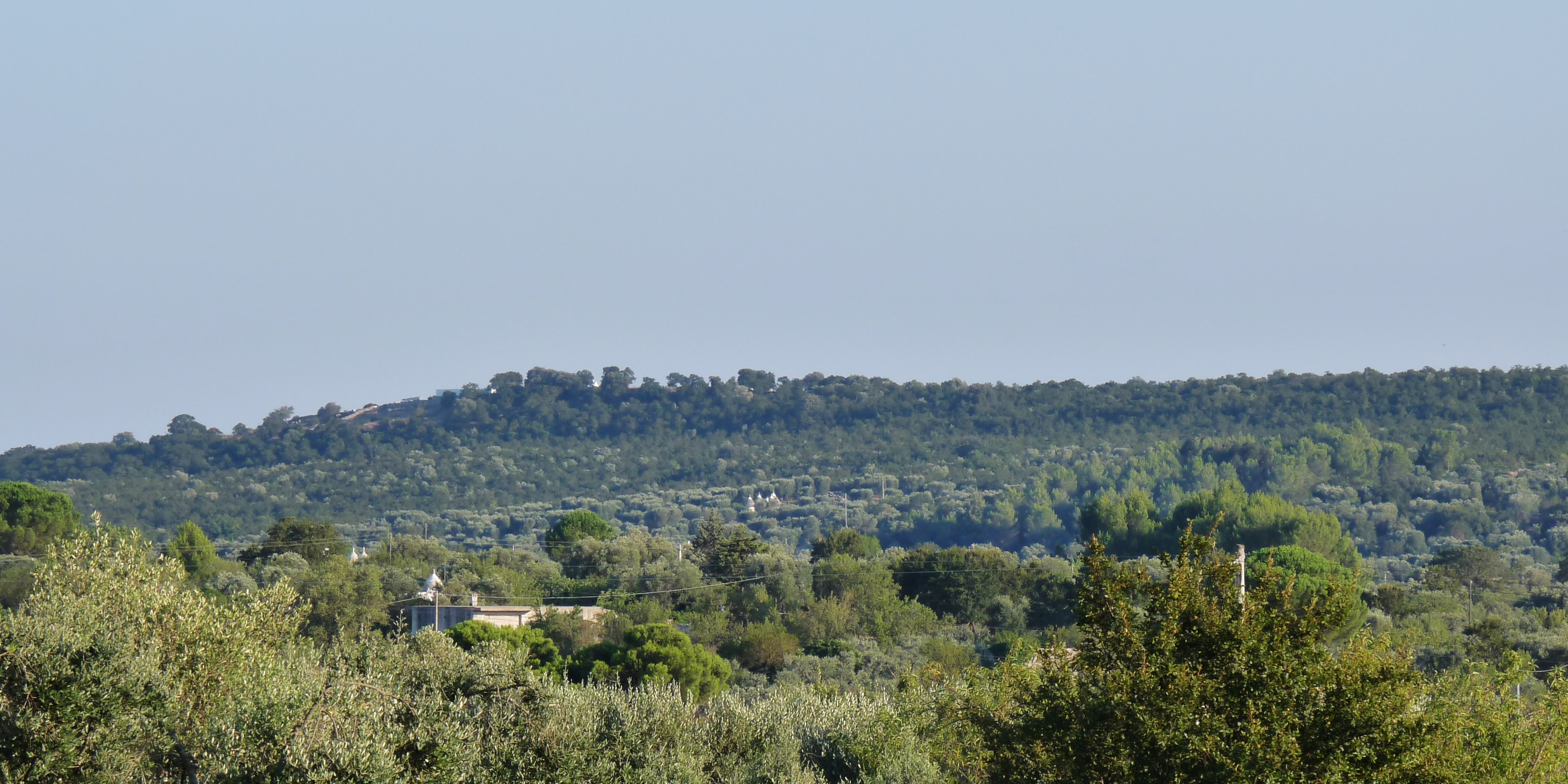 Nella foto una delle aree boschive più estese dell'agro di Ceglie Messapica sita in contrada San Pietro